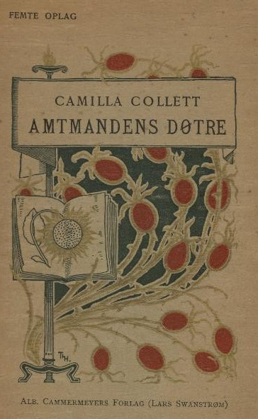 Omslag til Amtmandens Døtre, 5 utg. Publisert Kristiania : Cammermeyer , 1897. Tegnet av Th. Holmboe.